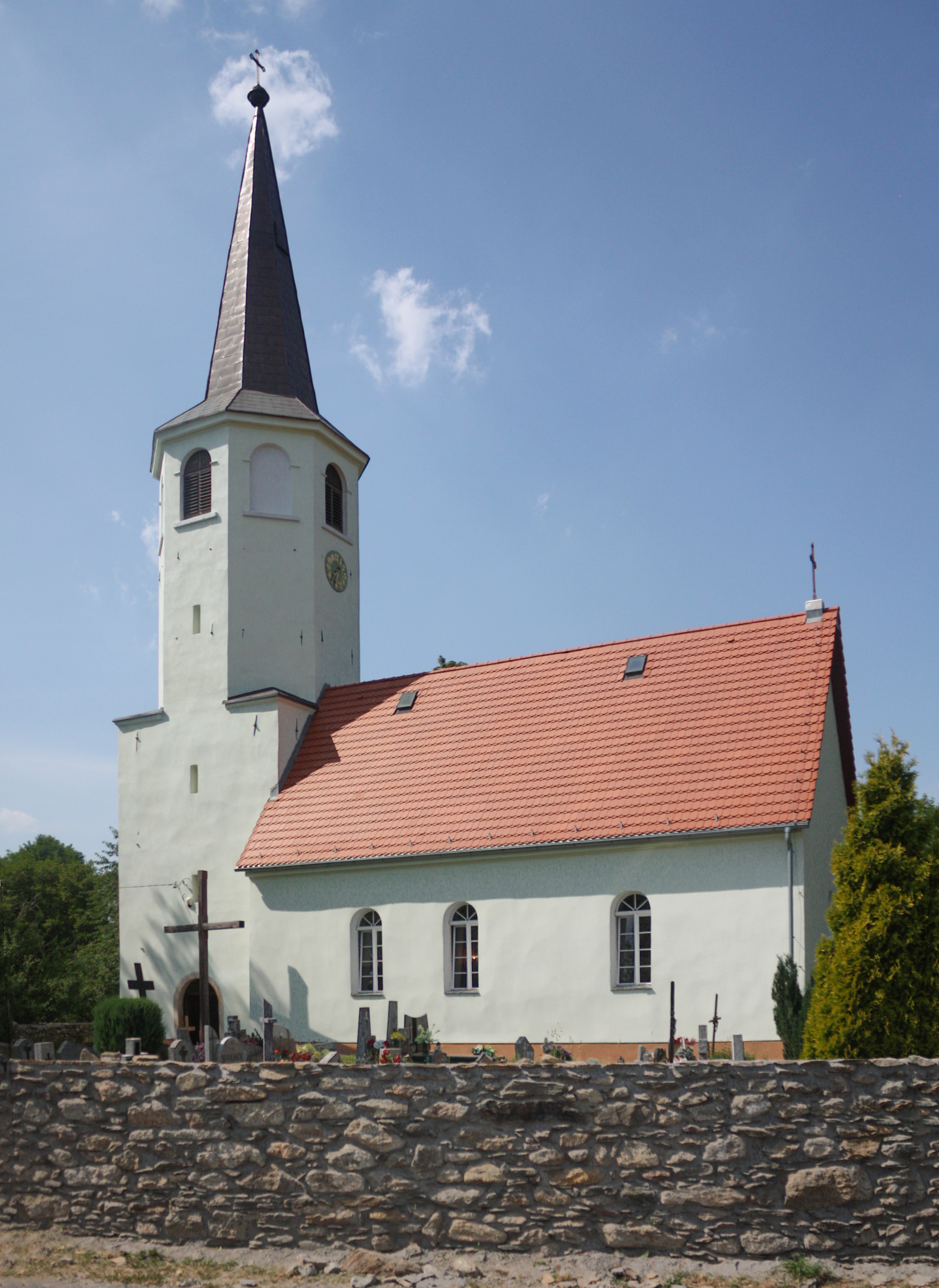 Proszowa - rzymskokatolicki kościół filialny p.w. św. Jana Chrzciciela, XV, XVIII You can see all photographs in category Wikiekspedycja 2013.